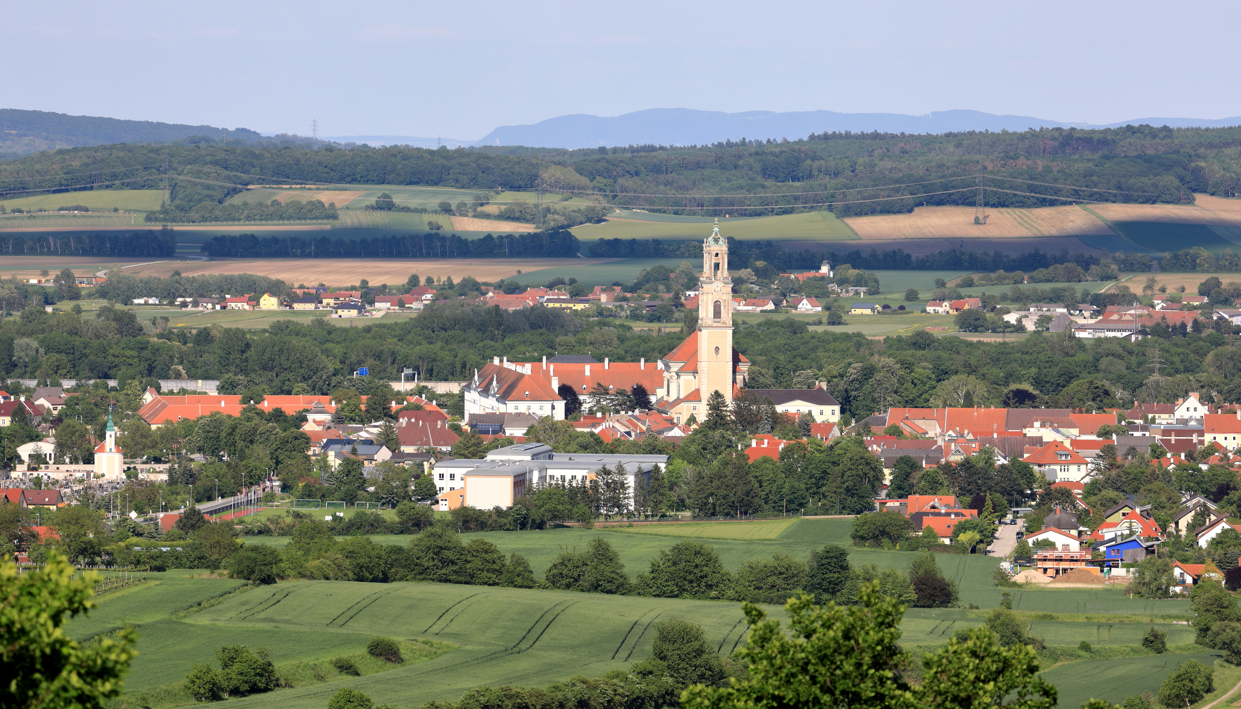 Westansicht der niederösterreichischen Stadt Herzogenburg mit dem markanten und ortsbildprägenden Turm der Stiftskirche des Augustiner-Chorherrenstiftes.